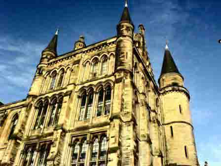 格拉斯哥大学主楼东翼南角 shot by GJSR @ GLASGOW 2006 via Sony Ericsson W800i 图片未经 Photoshop 作物理修改，但经过 Photoshop 降噪及饱和度色彩度处理。